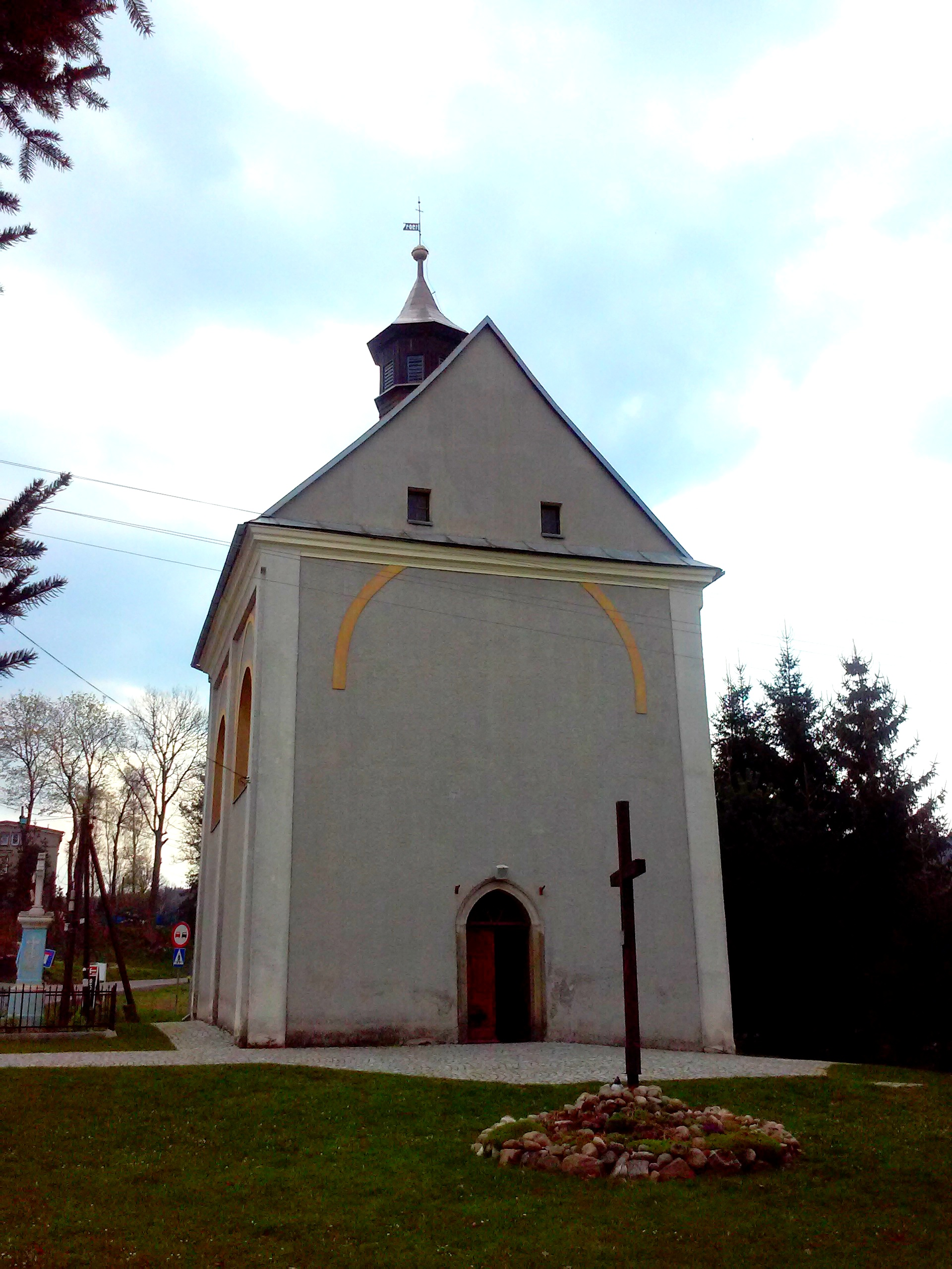 Przedwojów, Kościół św. Józefa Oblubieńca Wikidata has entry Q30046249 with data related to this item.